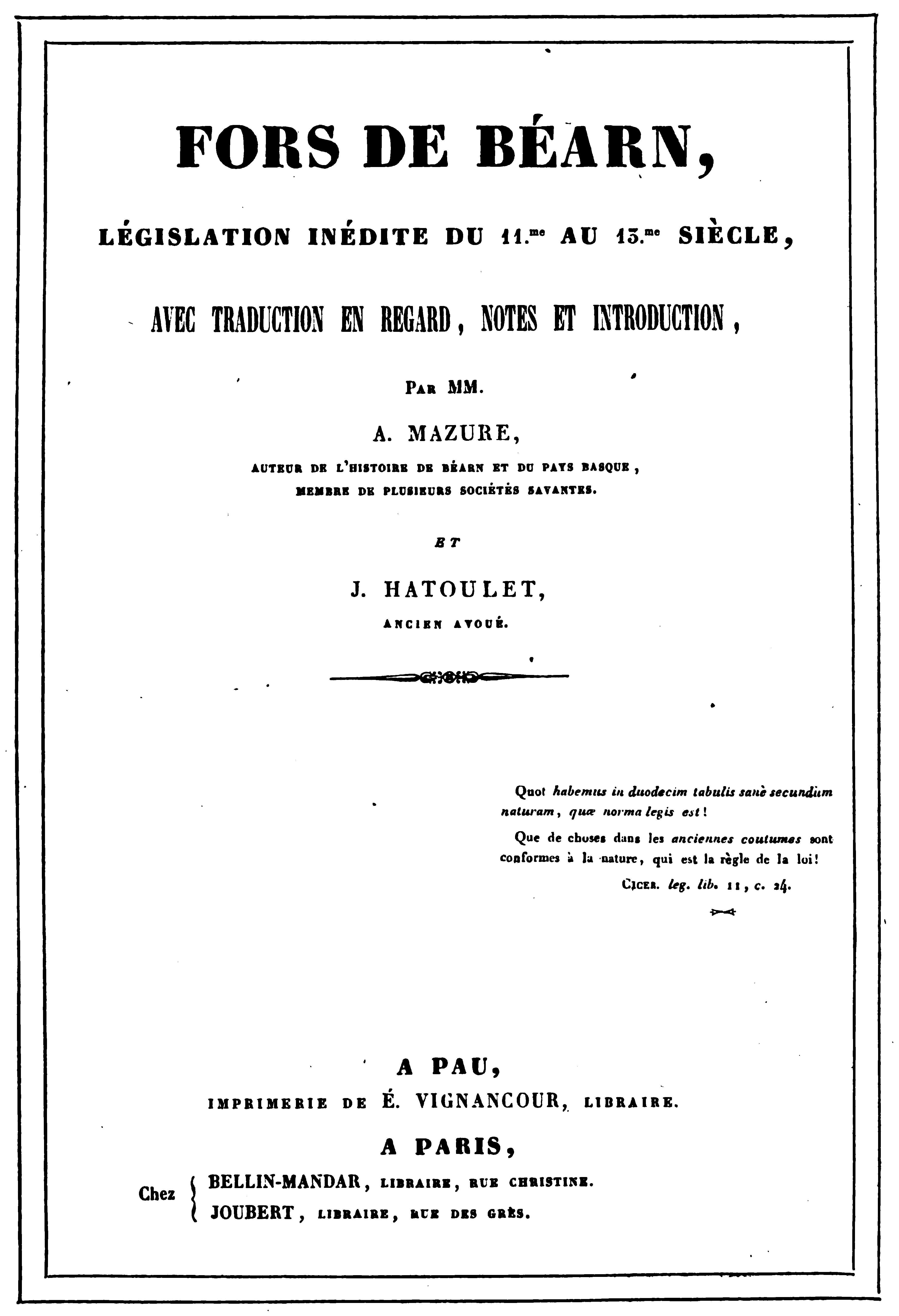 Première page de l'édition de Fors de béarn de Mazure et Hatoulet